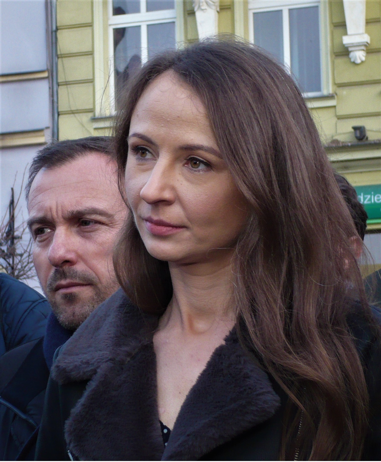 Protest przeciwko likwidacji oddziału wewnętrznego szpitala w Nowej Rudzie z udziałem m.in.: Agnieszki Dziemianowicz-Bąk i Mariusza Kotarby (na fot.). Rynek, Nowa Ruda, 09.02.2020 r.